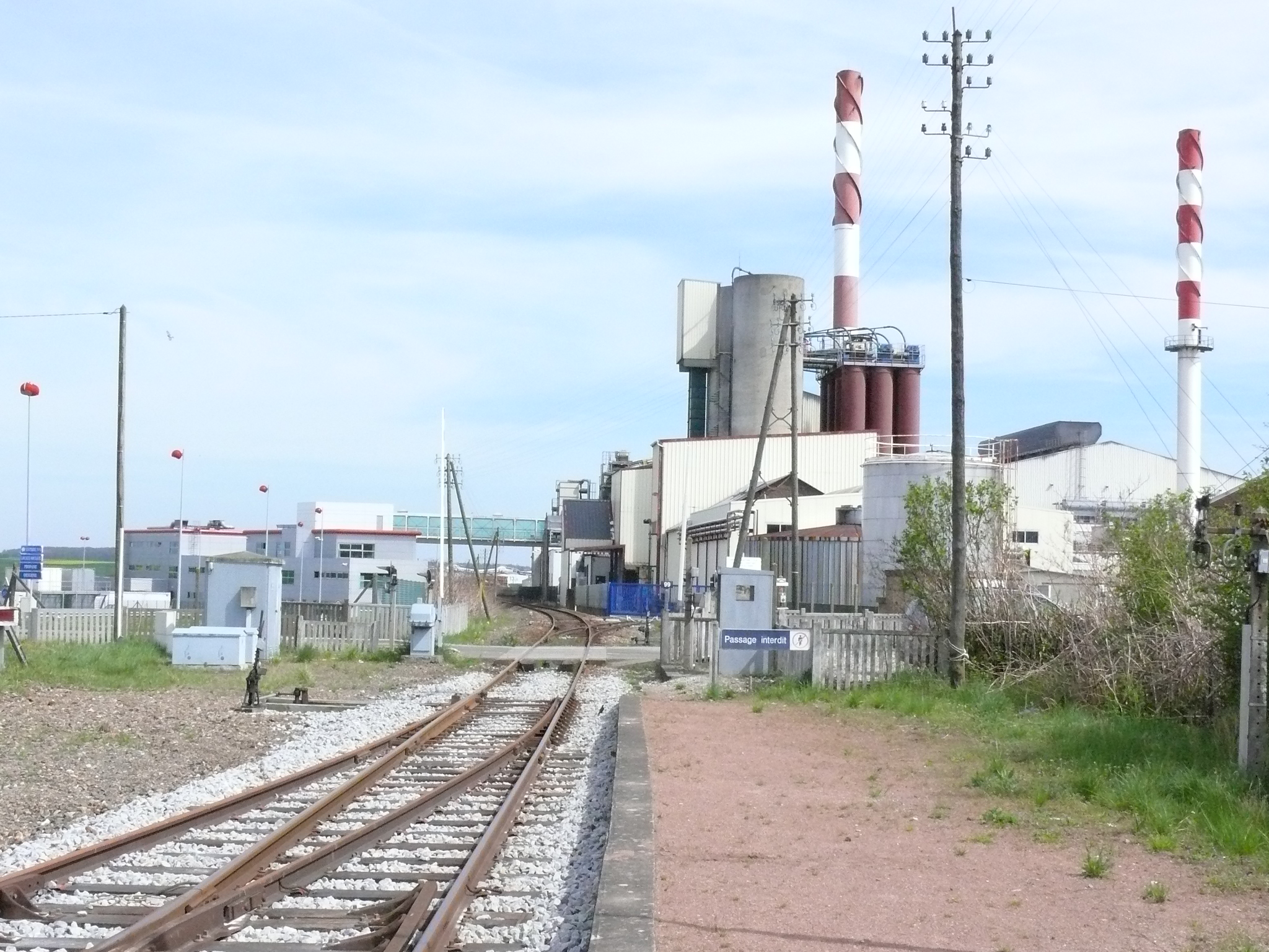 L'embranchement industriel de la verrerie Saverglass, à la sortie de la gare de Feuquières-Broquiers (côté Beauvais)